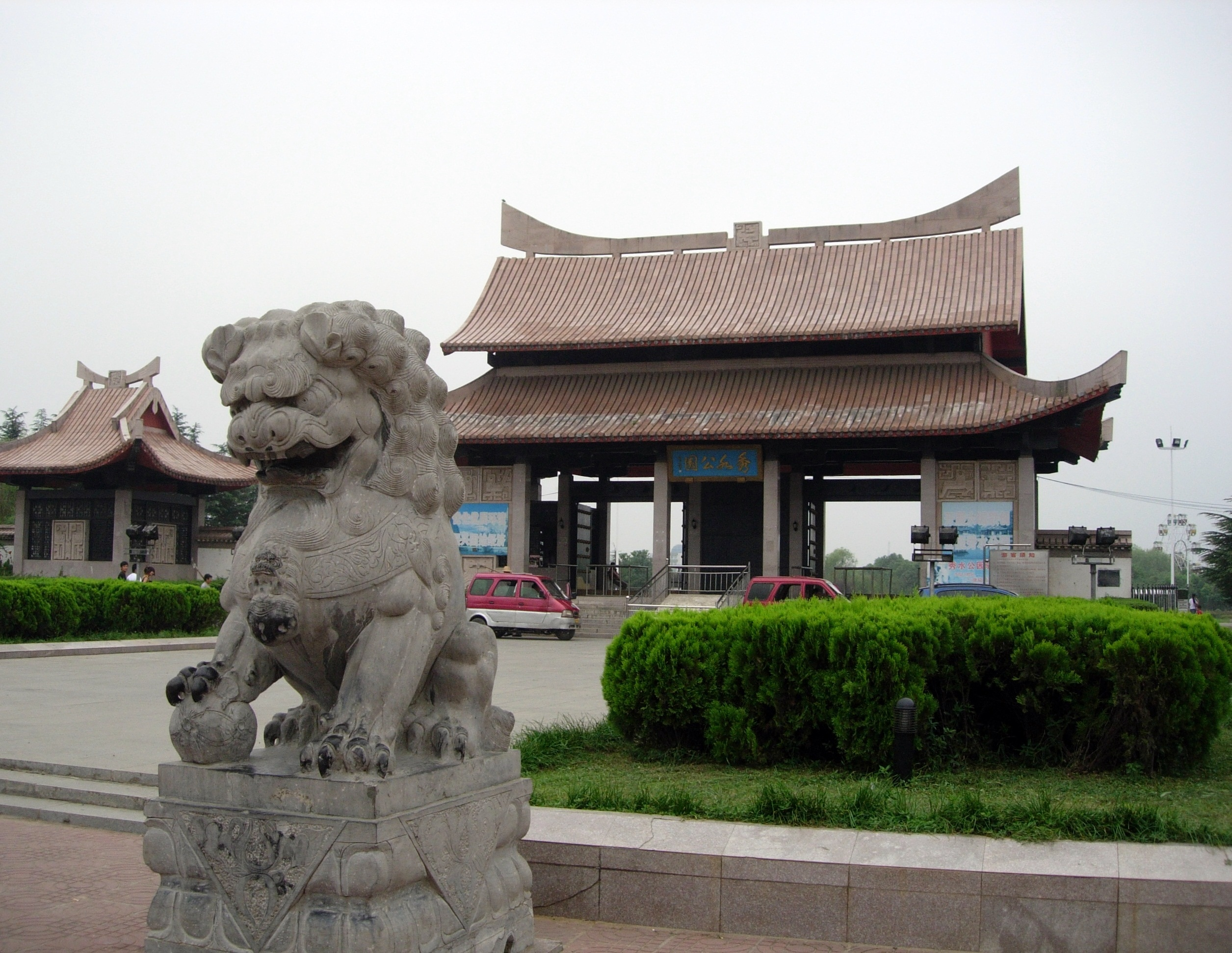 固始县秀水公园东门外景